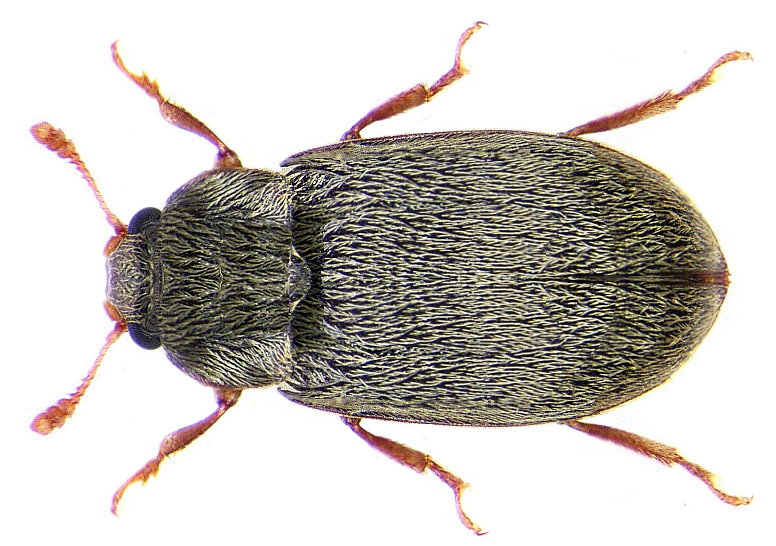 Byturus tomentosus (Geer, 1774) Familie: Byturidae Groesse: 3,2-4 mm Verbreitung: Europa Ökologie: Entwicklung in Himbeeren und Brombeeren Fundort: Germania, Bayern, Oberfranken, Selbitz leg.det. U.Schmidt, 2002 Photo: U.Schmidt, 2005